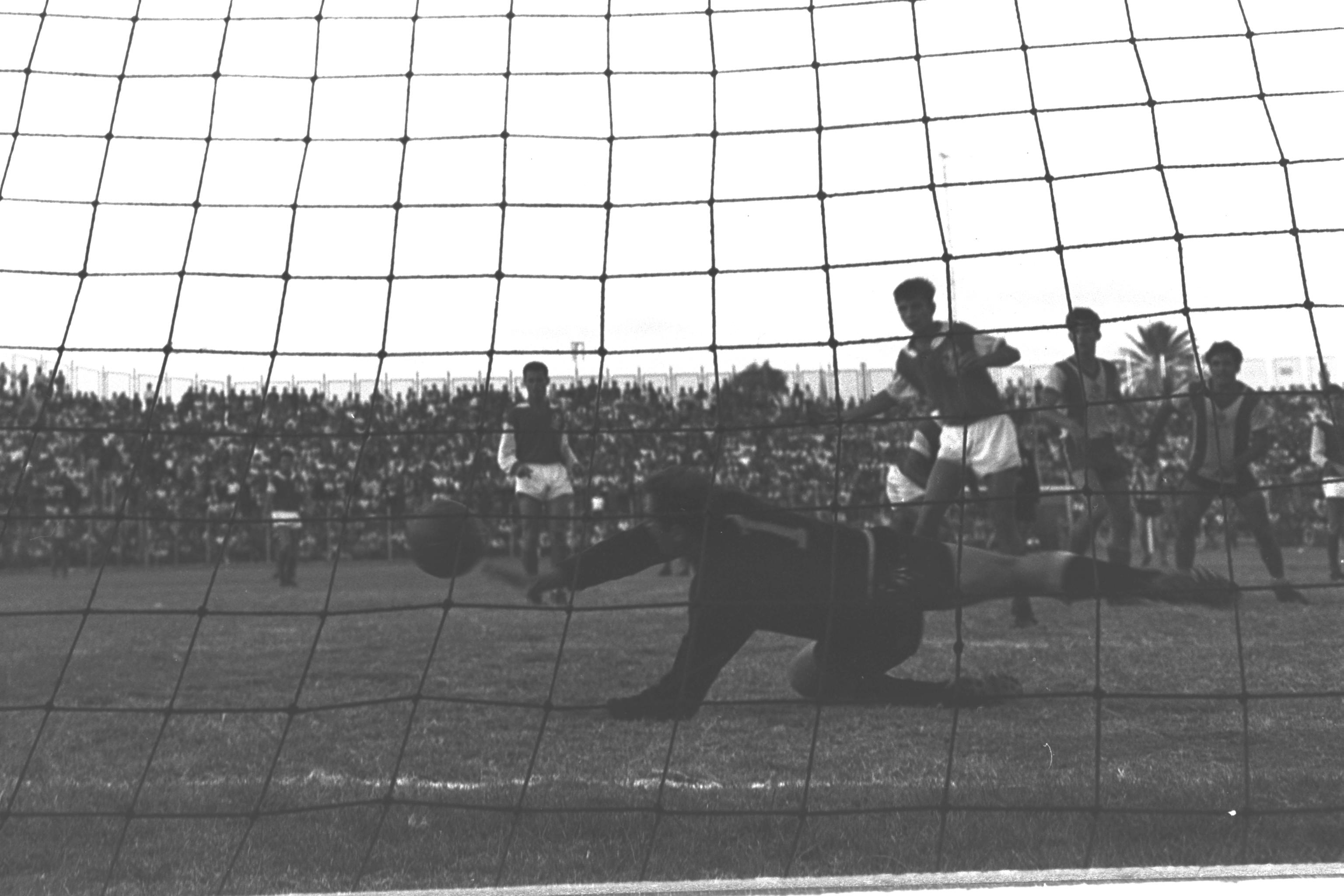 Hapoel Haifa goalie in action during the Soccer Cup Final against Maccabi Tel- Aviv, held at Jaffa's Bloomfield Stadium. שוער הפועל חיפה בפעולה במהלך משחק גמר גביע המדינה בכדורגל אל מול מכבי תל אביב, באיצטדיון בלומפילד